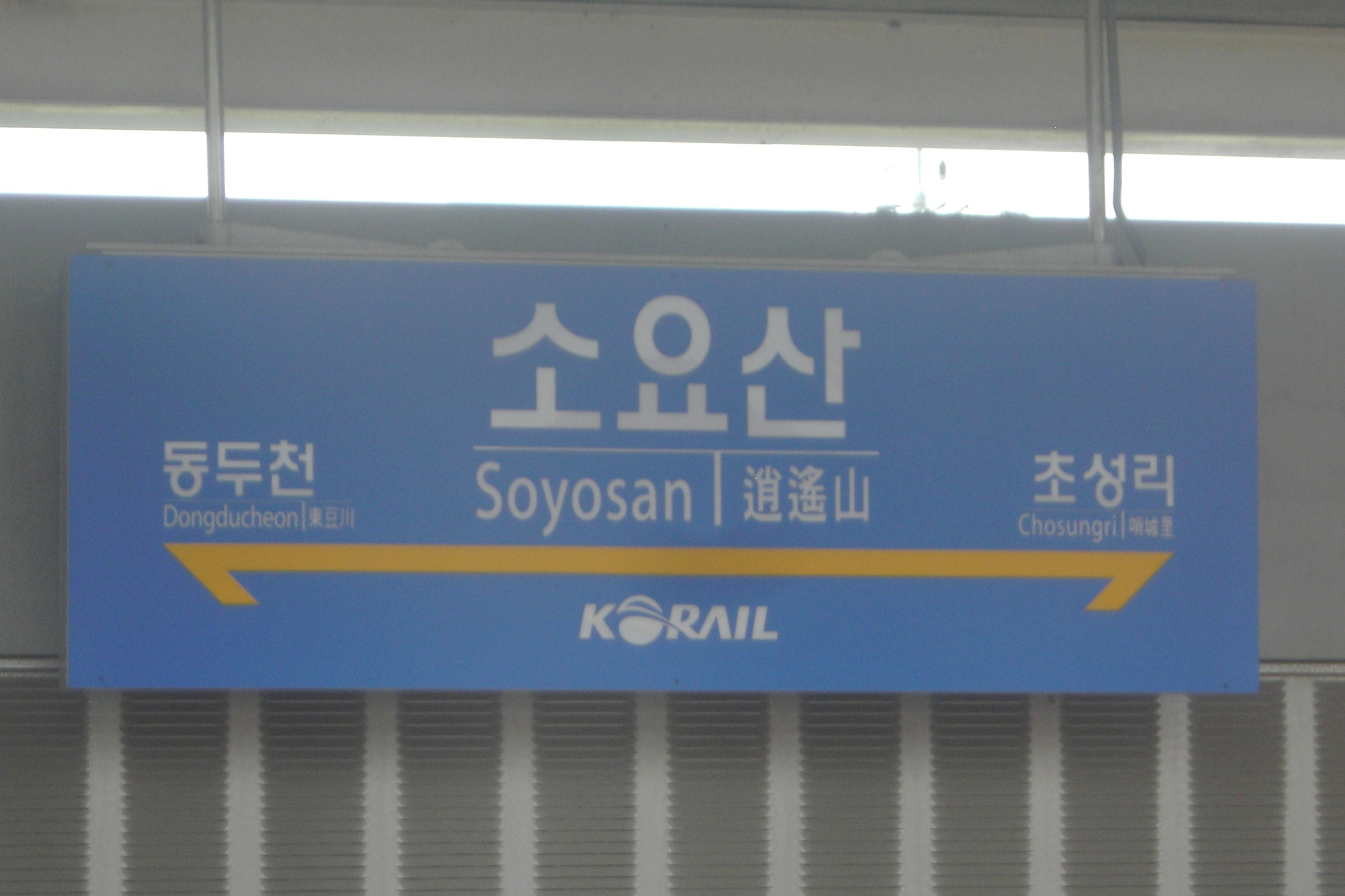 소요산역 통근열차 승강장 역명판